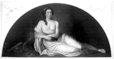 Bildnis der Sophia Gräfin von Coudenhoven (1747-1825) als Muse Thalia; Öl auf Leinwand, 77 X 147 cm von Johann Kaspar Schneider, 1784, Landesmuseum Mainz, Inv. Nr.: 1312. (Schwarzweißfotographie)